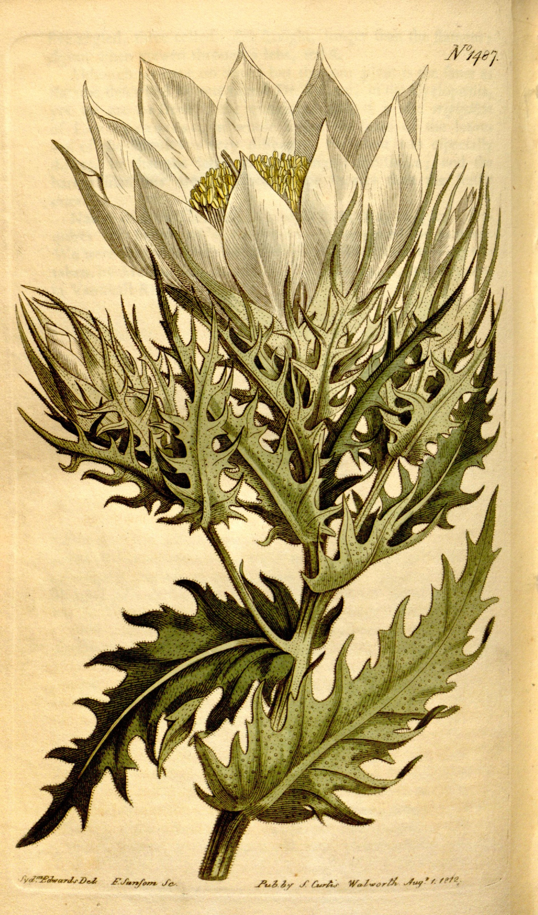 WTfi^W^/W FJ^n/^ jfc ^i&y S&.rA,r W*J—rlt Jkf?*